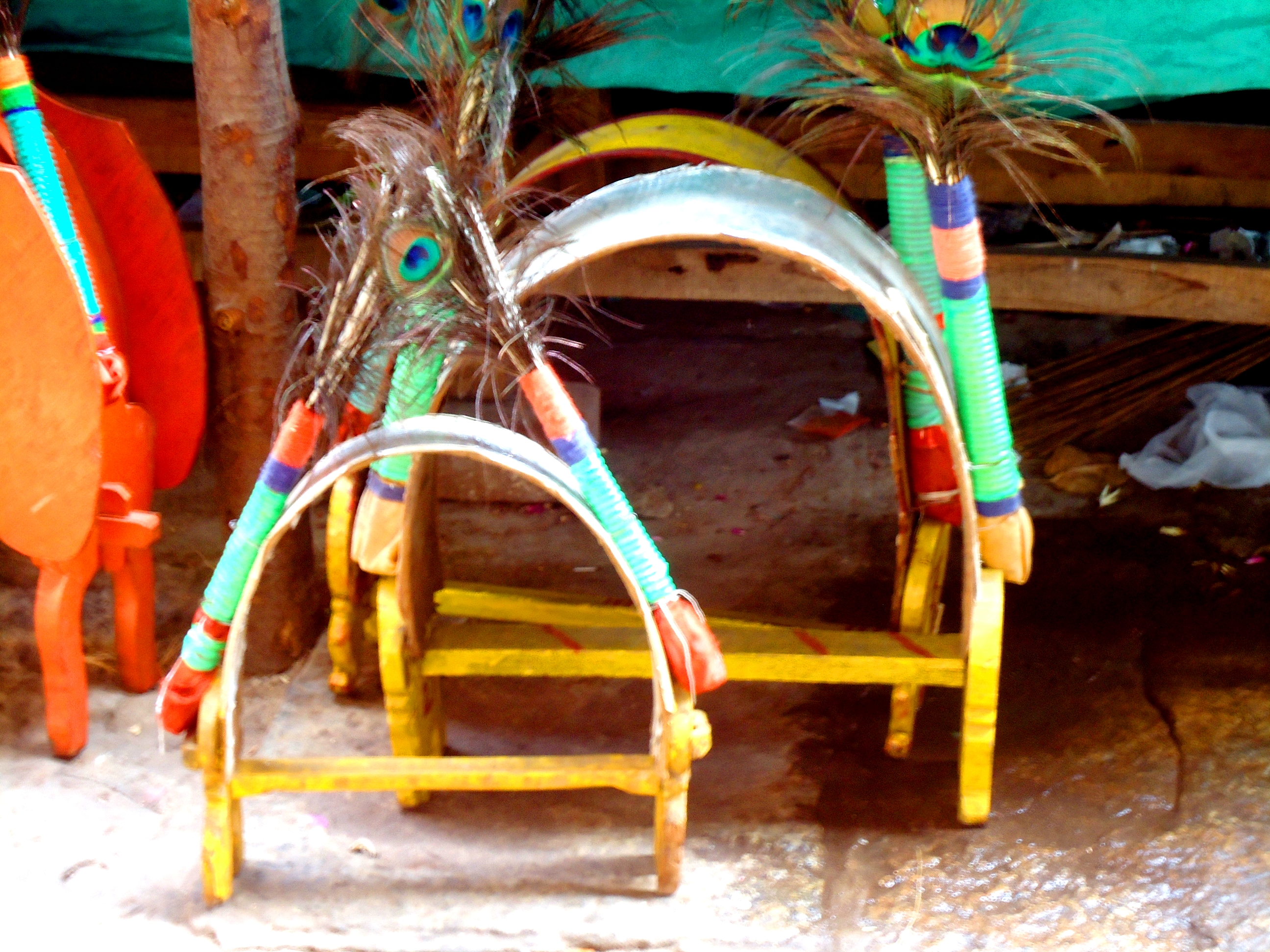 Palani Kavadi